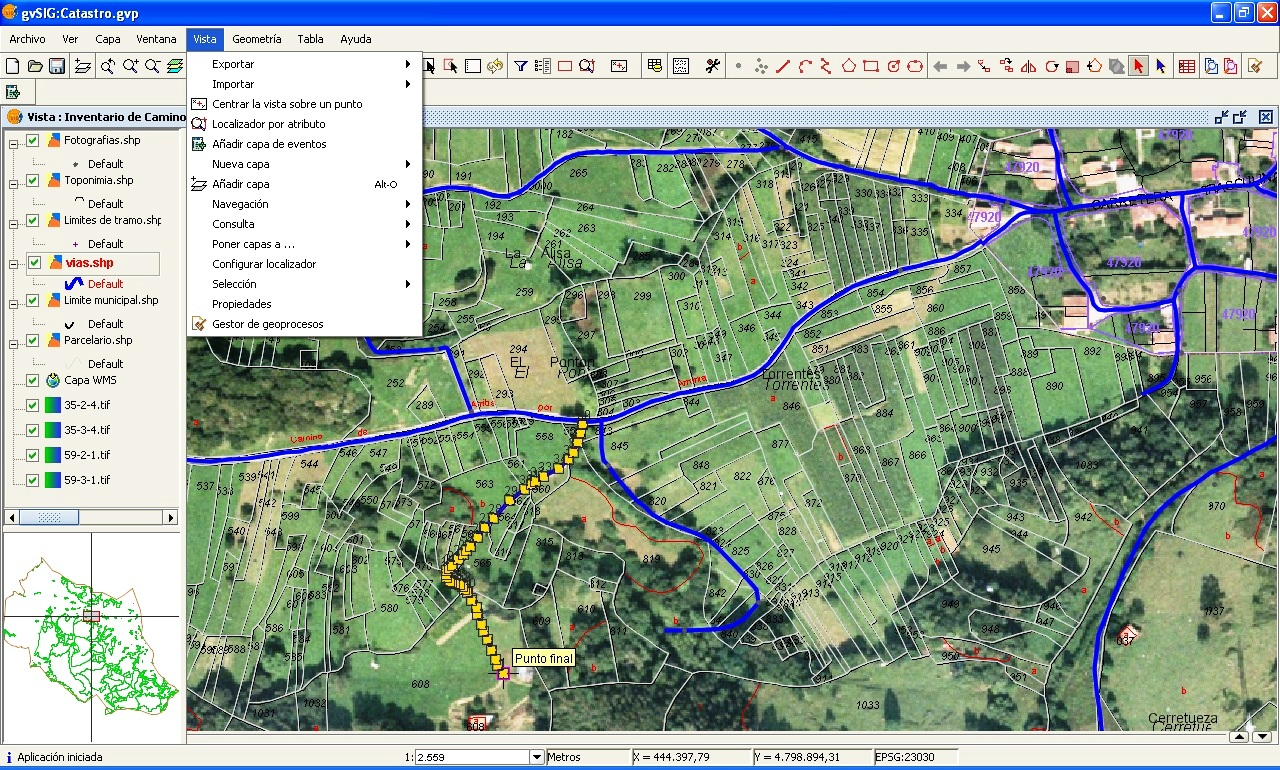 gvSIG 1.0